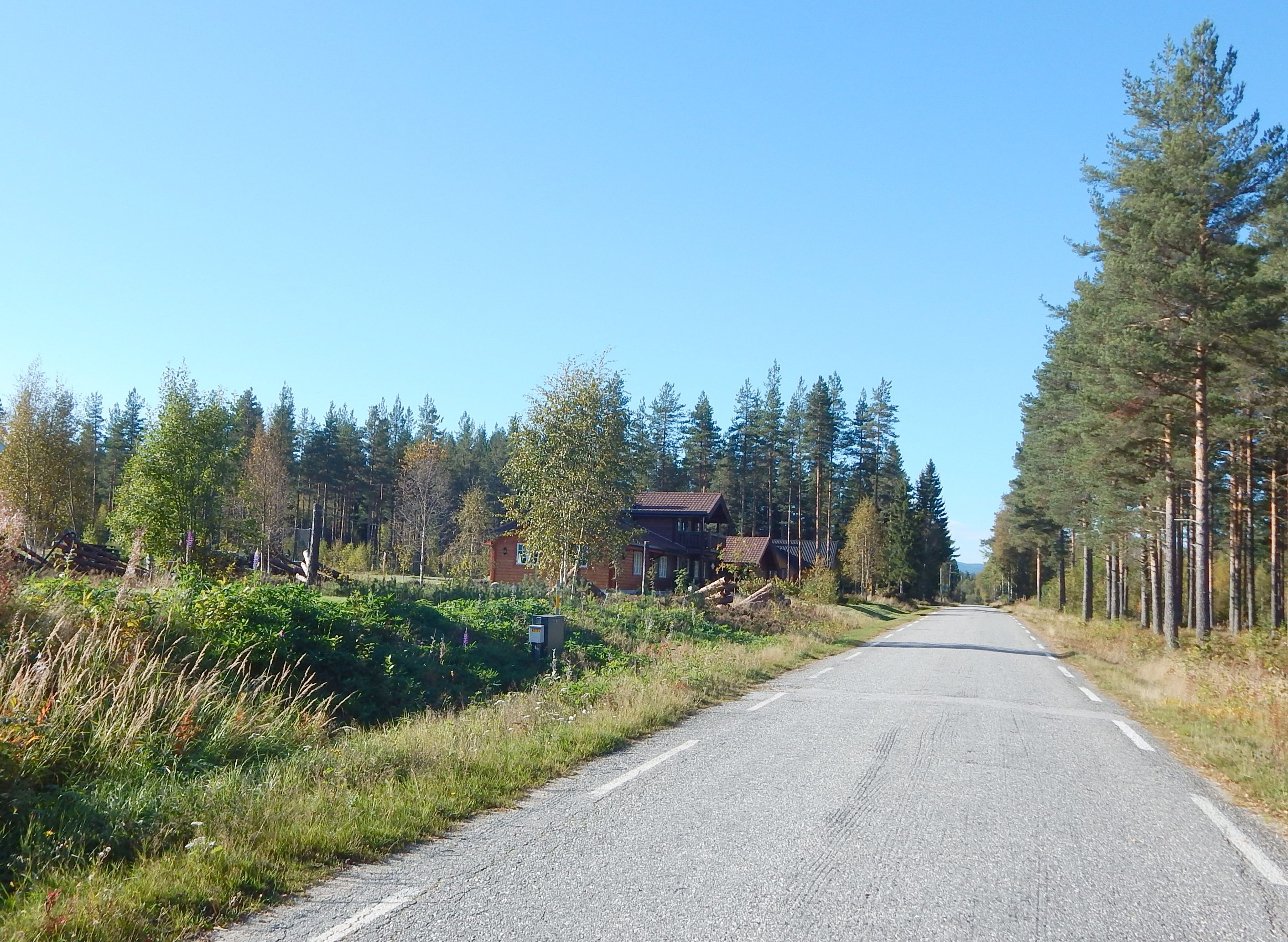 Steinvikveien (FV636) ved Steinvik